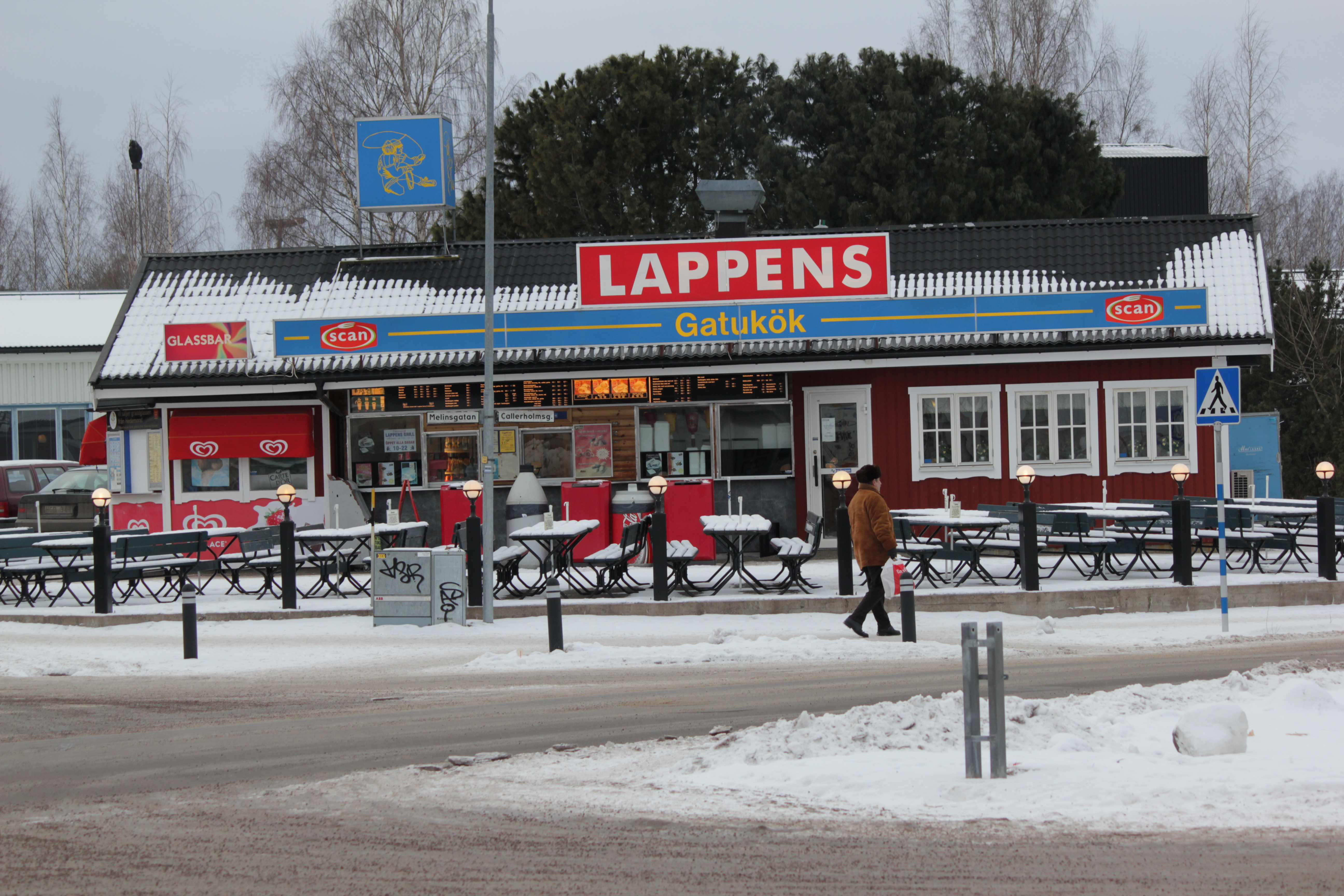 Lappens Gatukök, Hedemora, Sverige